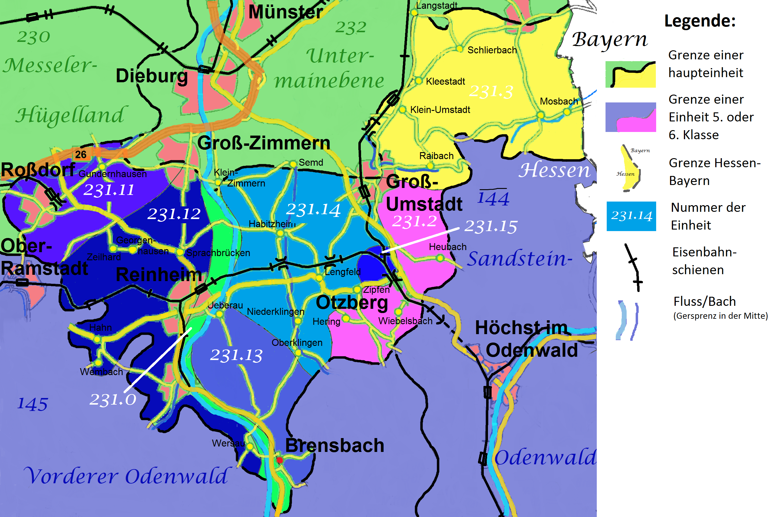 Karte des Reinheimer Hügellandes